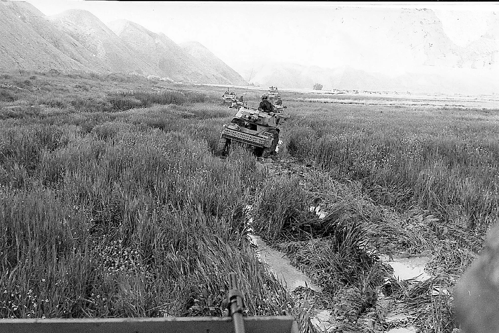 פעולת כראמה. שקיעת השריונריות סז'וק ליד הירדן.